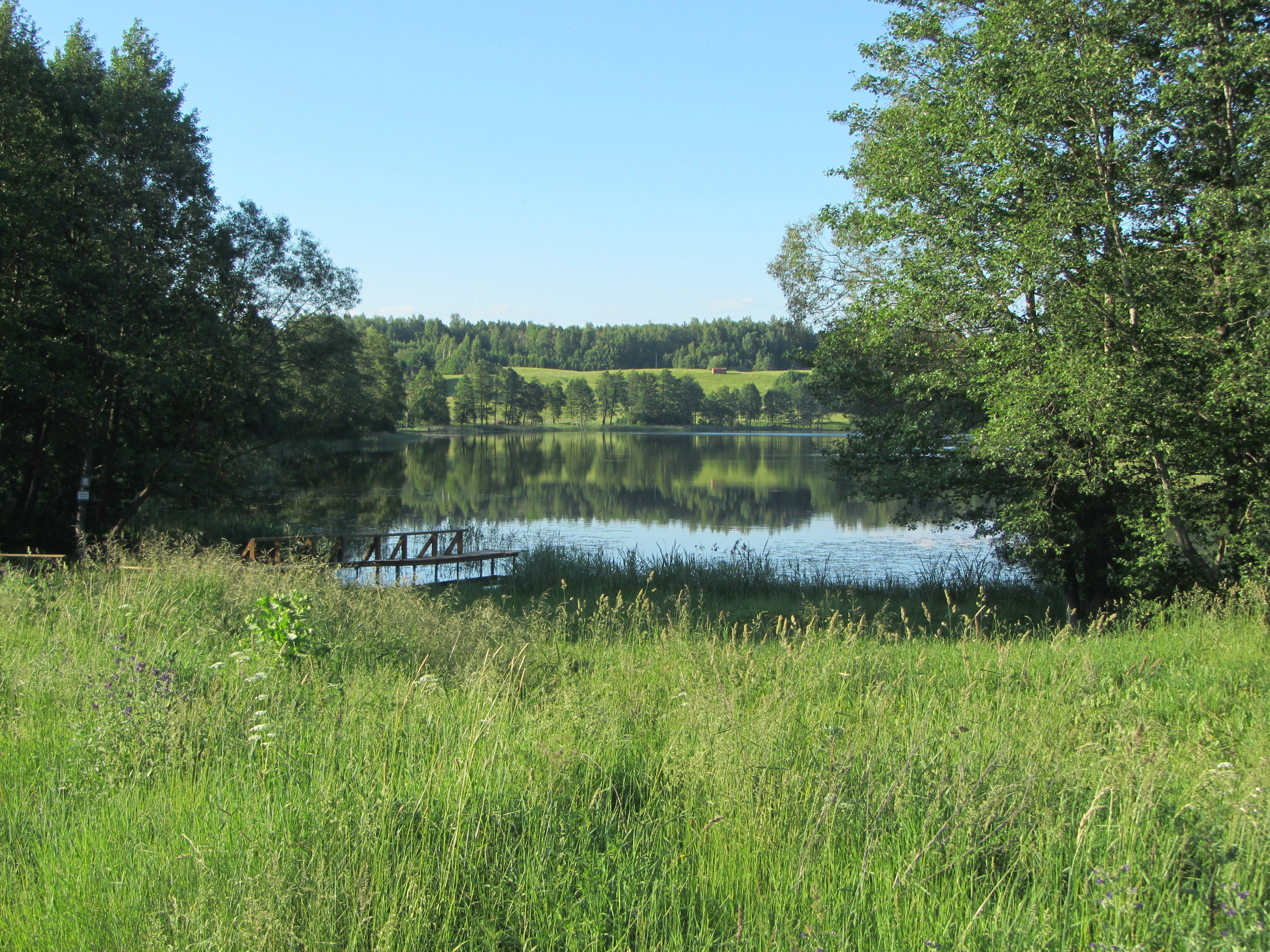 Alantos sen., Lithuania